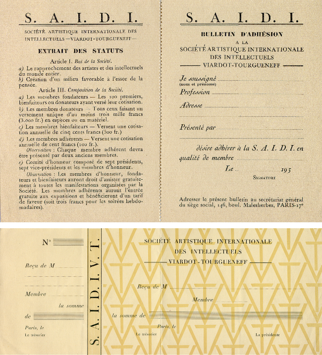 копия устава SAIDI (Société Artistique Internationale des Intellaectuels — Viardot —Turgeneff —. Paris. 1930-e)и членского билета авторства Льва Шульца